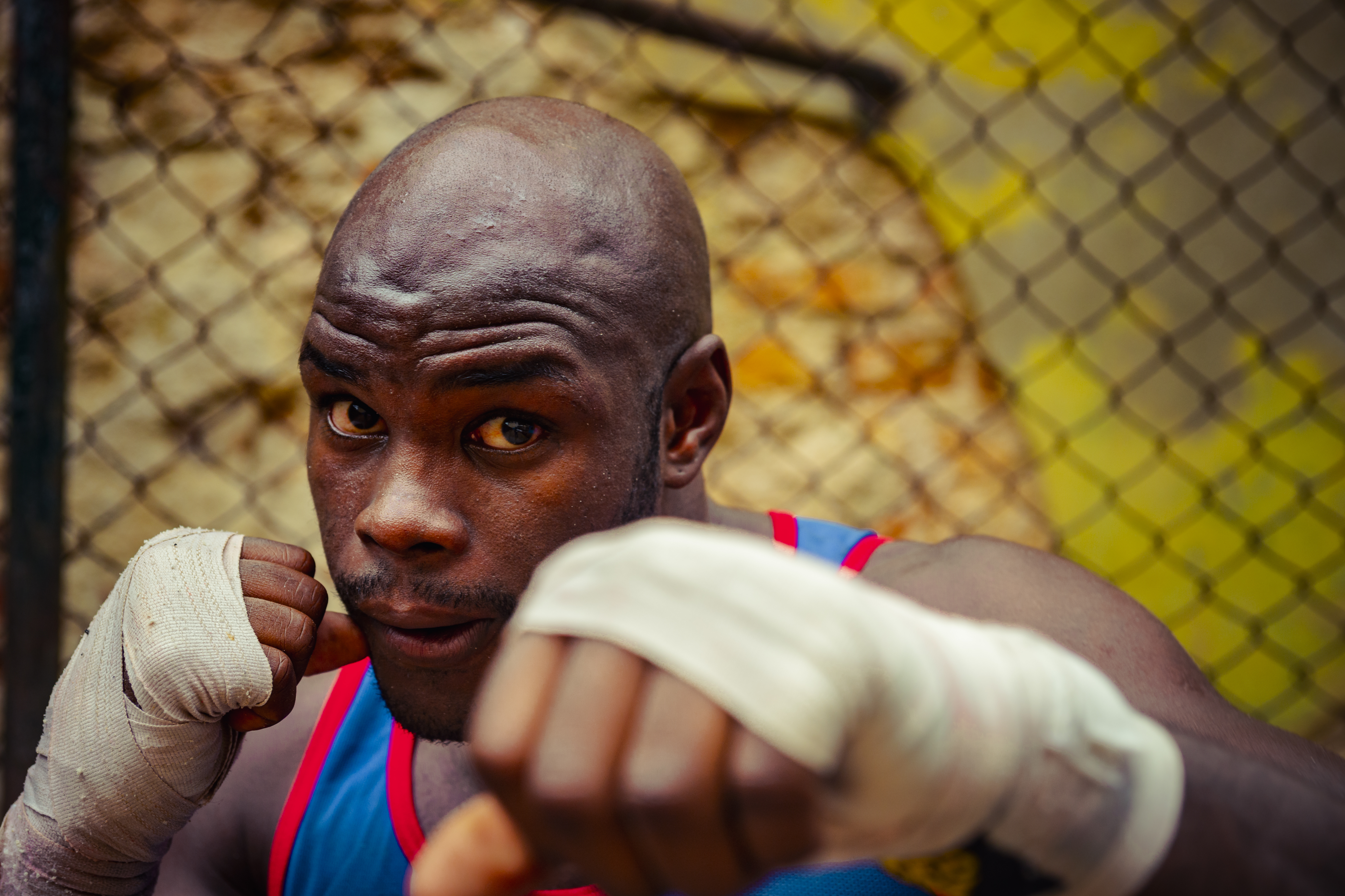 Emílio Correa Jr.